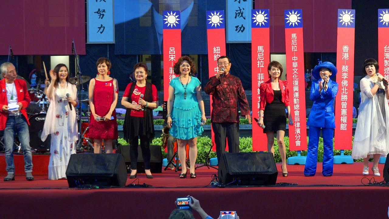 我愛國旗嘉年華-音樂饗晏